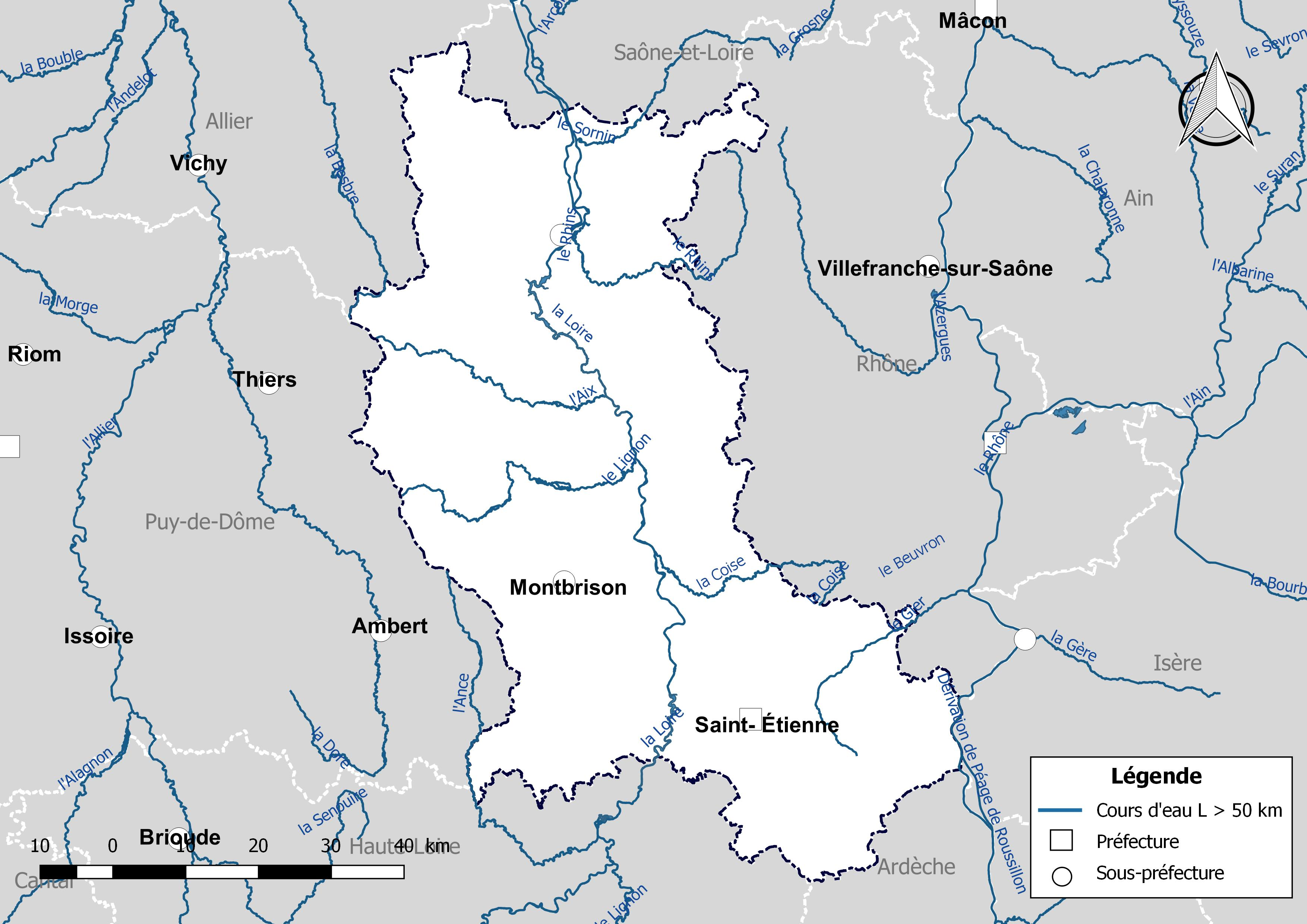 Carte des cours d'eau de longueur supérieure à 50 km drainant le département de la Loire (France).